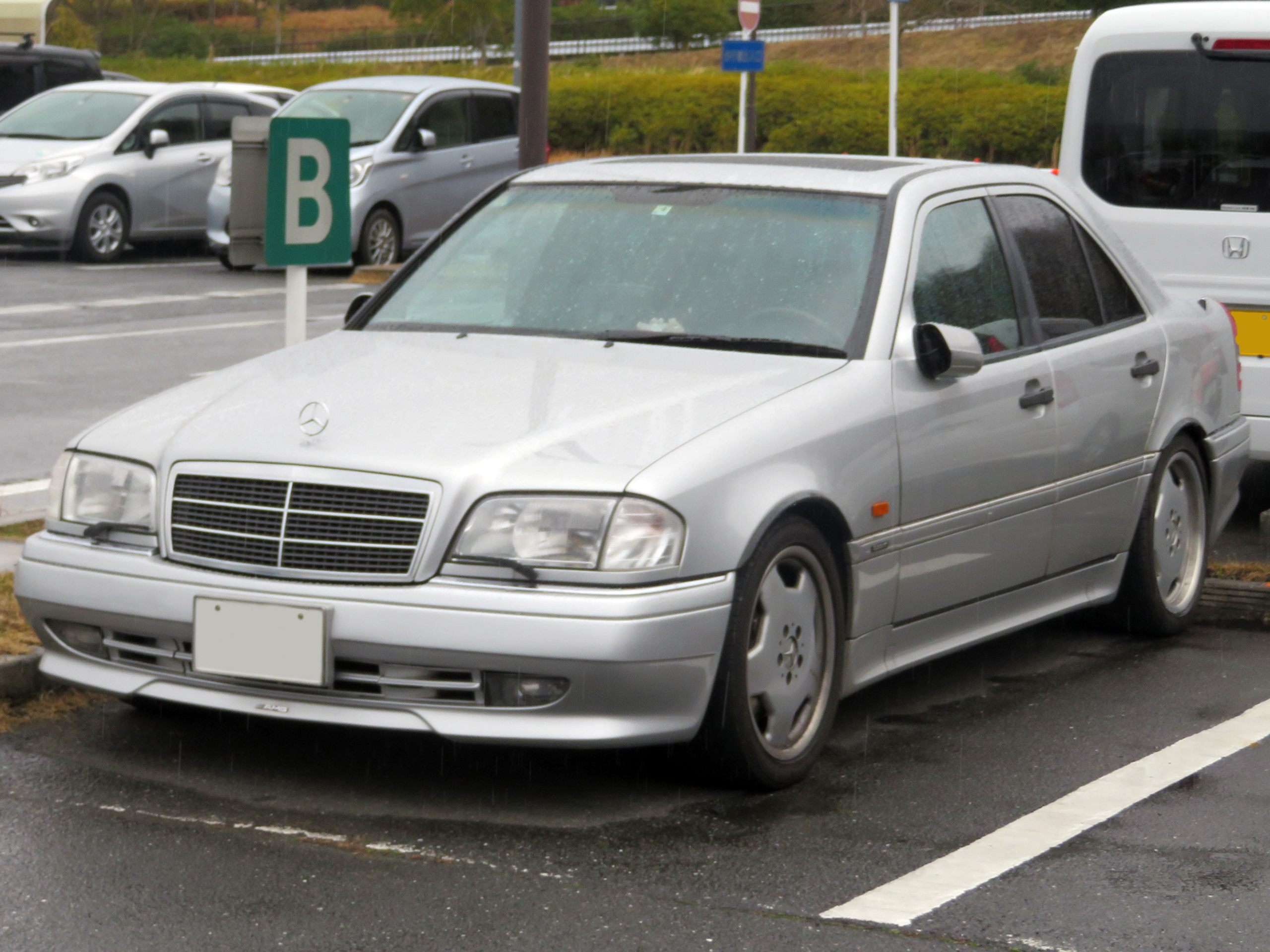 W202系メルセデス・ベンツ・AMG C36をフロントから撮影。